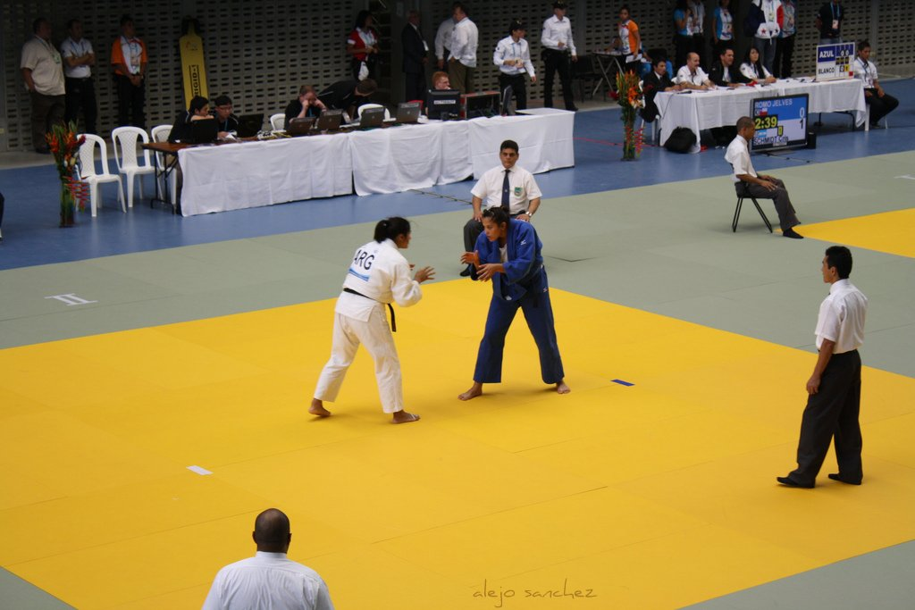 Judo en los Juegos Sudamericanos de 2010